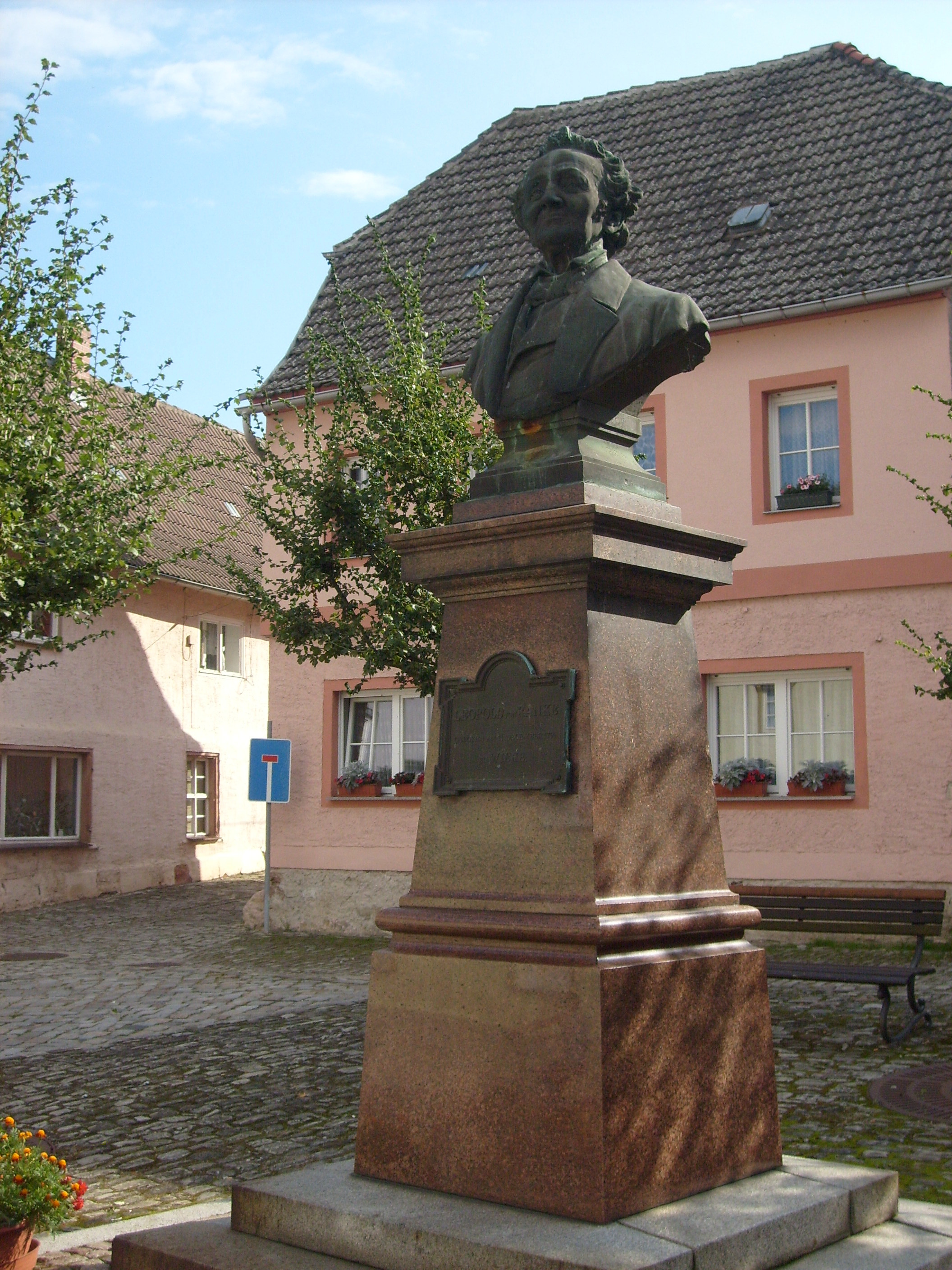 Rankedenkmal neben dem Rathaus